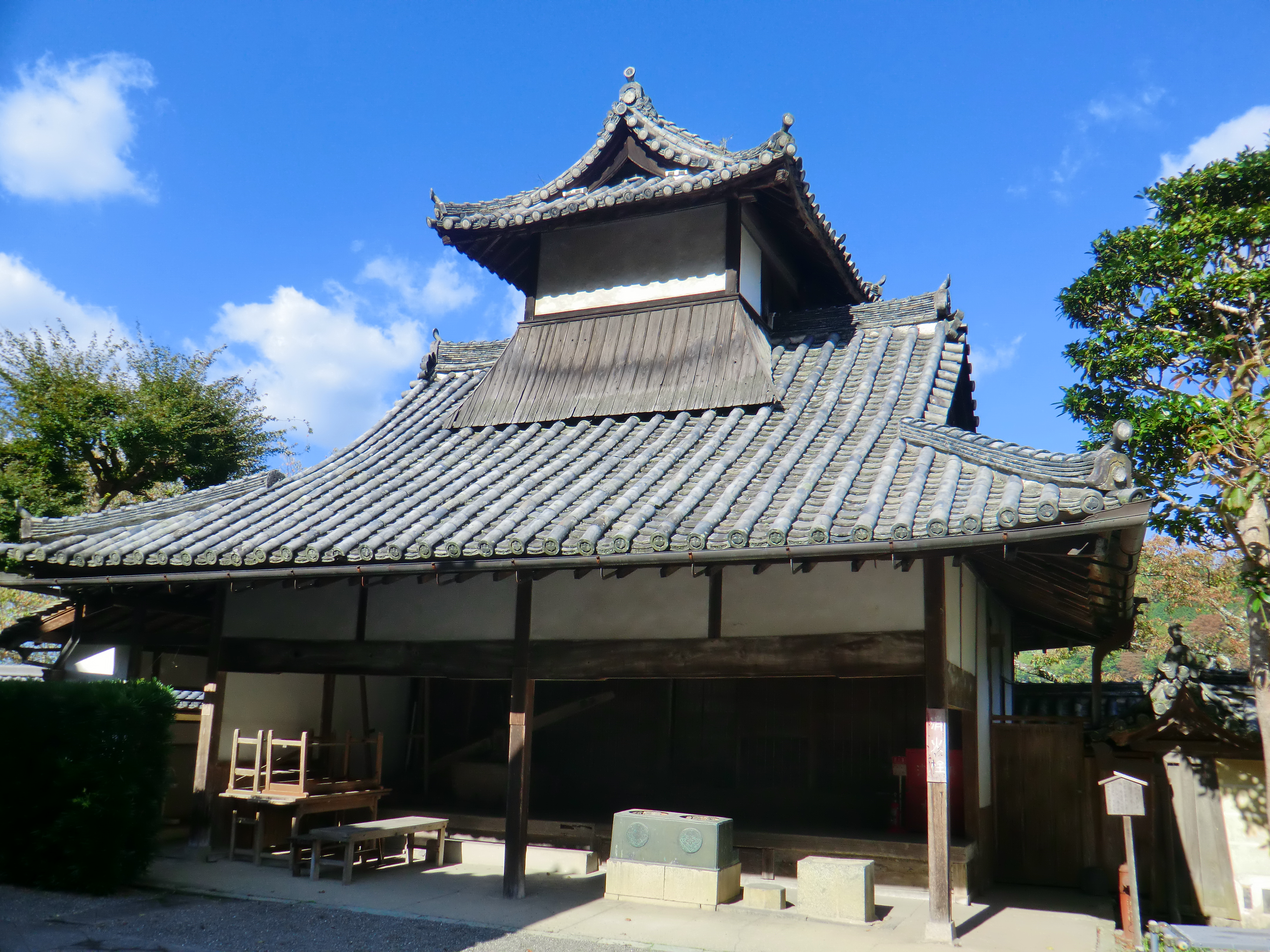 本善寺茶所 (登録有形文化財)